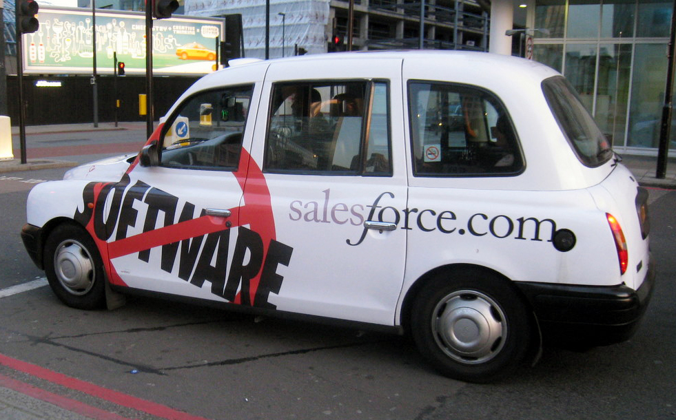 taxi!